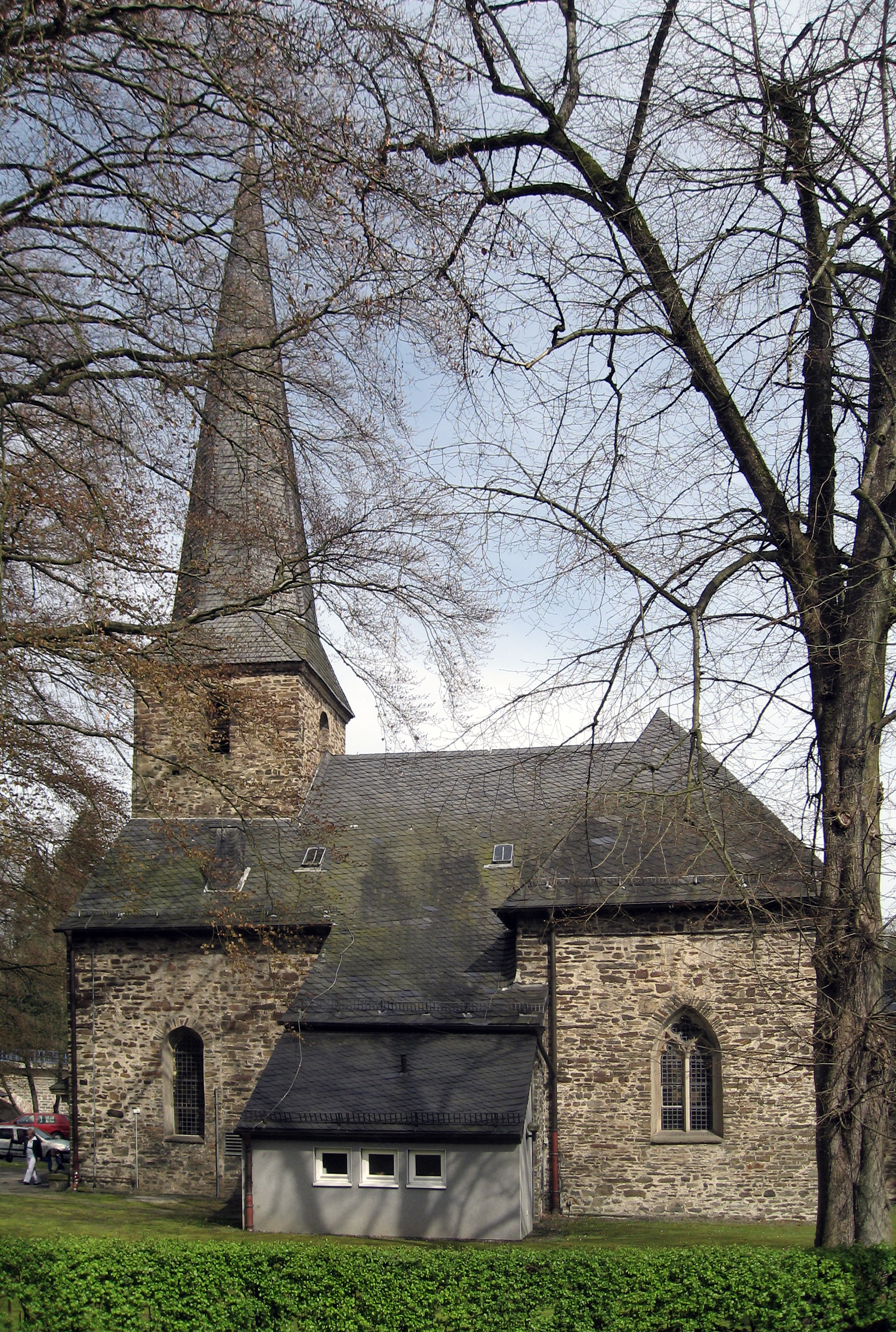 Deutschland, NRW, Westfalen, Hagen-Dahl, Baudenkmal #271: Evangelische Kirche mit Chor aus dem 13. Jahrhundert, Sakristei aus dem 14. Jahrhundert, Rest nach Brand 1730 wieder aufgebaut, ursprünglich Besitz des Dahler Adelshauses, erste urkundliche Erwähnung eines Pfarrers von "Dael" 1273; Im Inneren Altar von 1774, Taufstein von 1696, Kanzel von 1738, Kirchengestühl von 1730, 1963 wurden Wandmalereien aus dem 14. Jahrhundert freigelegt mit Szenen aus dem Leben der Hl. Katharina von Alexandrien